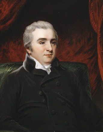 Painting, miniature; Miniatures